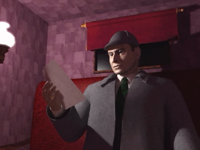 Capture d'écran du jeu Sherlock Holmes : le Mystère de la momie. On y voit Sherlock Holmes, lisant la lettre d'Elisabeth Montcalfe dans l'intro du jeu.